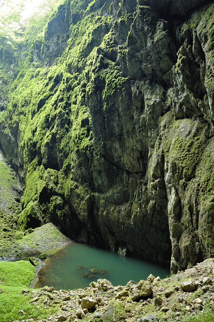 Propast Macocha